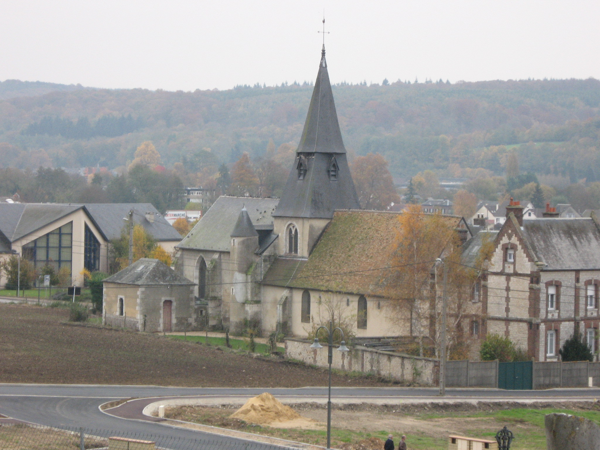 église Saint-Georges de Romilly-sur-Andelle, Eure, France